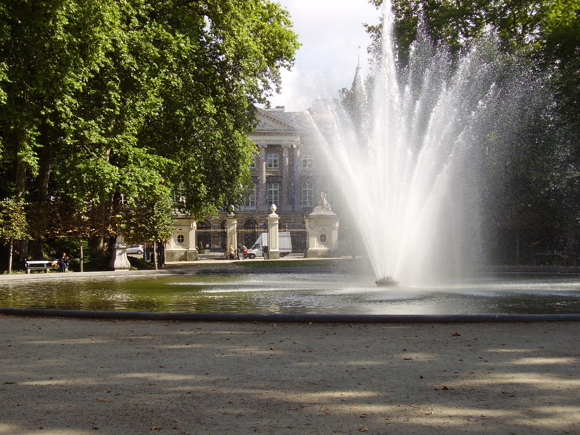 Fontaine dans le parc de Bruxelles.